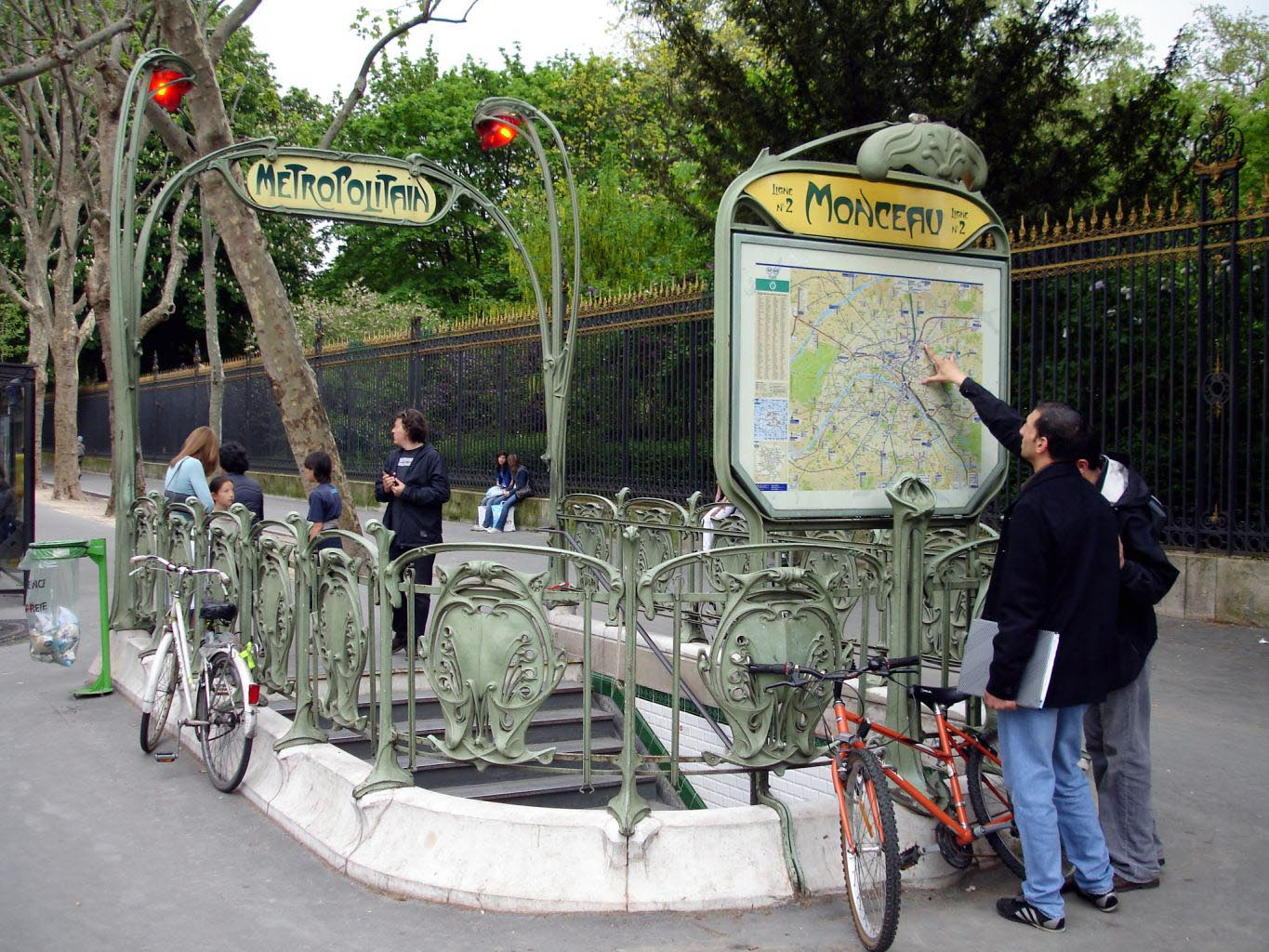 Métro de Paris - ligne 2 - Station Monceau (France)